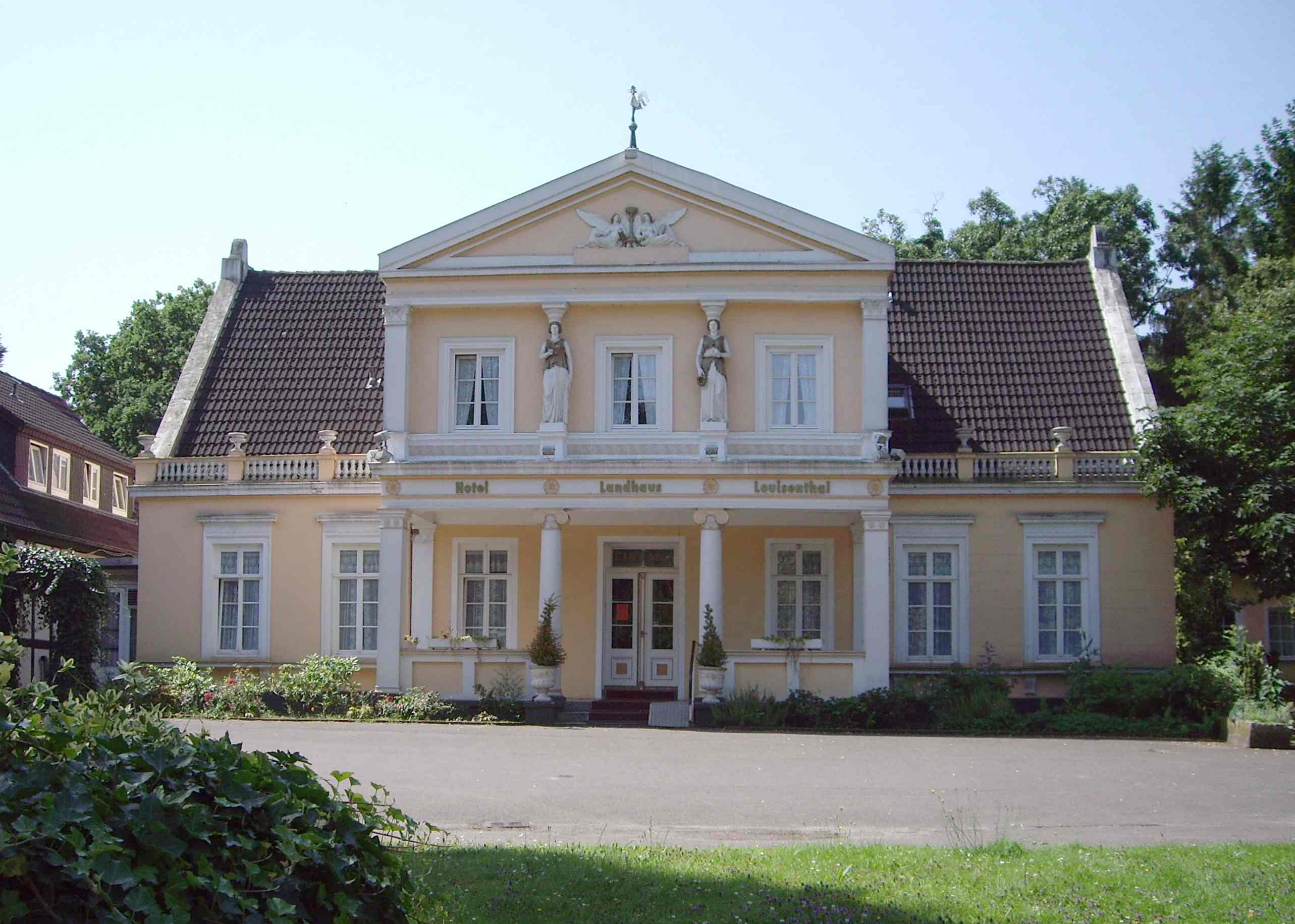 Landhaus Louisenthal Das abgebildete Objekt ist ein geschütztes Kulturdenkmal in der Freien Hansestadt Bremen, mit der Nr. 0842 beim Landesamt für Denkmalpflege registriert.